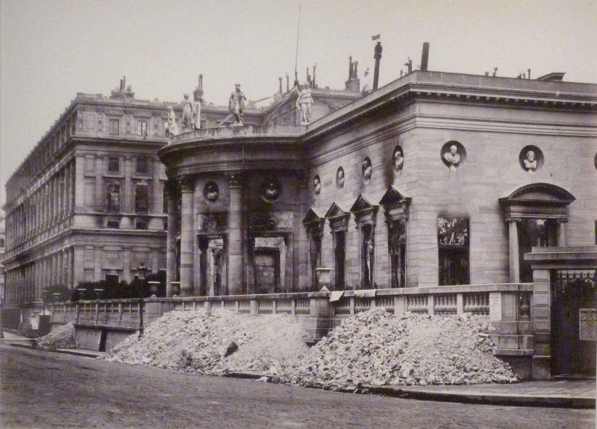 Exposition La Commune de Paris à l'Hôtel de Ville de Paris (18 mars - 28 mai 2011) - Palais de la Légion d'Honneur, en arrière plan, l'ancien palais d'Orsay, incendié sous la Commune.